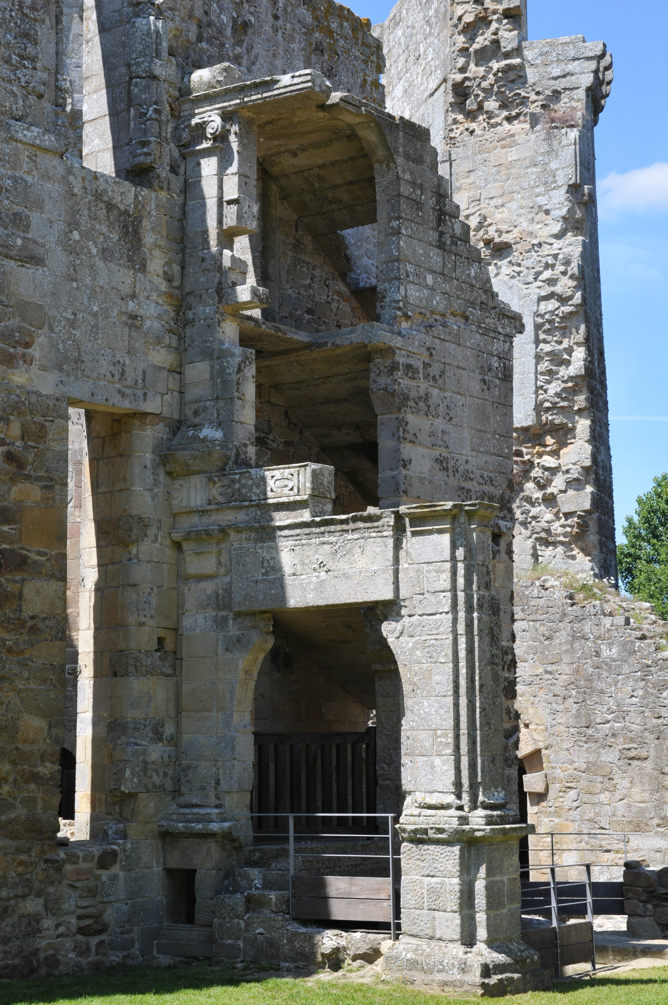 Reste des Treppenhauses in der Burgruine La Hunaudaye, Frankreich